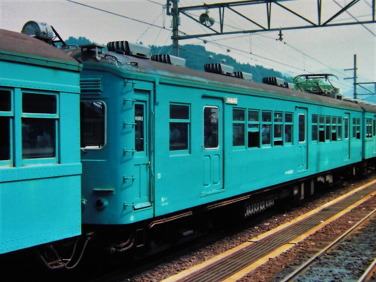 国鉄40系電車 クモハ54101 改造にて51系に編入